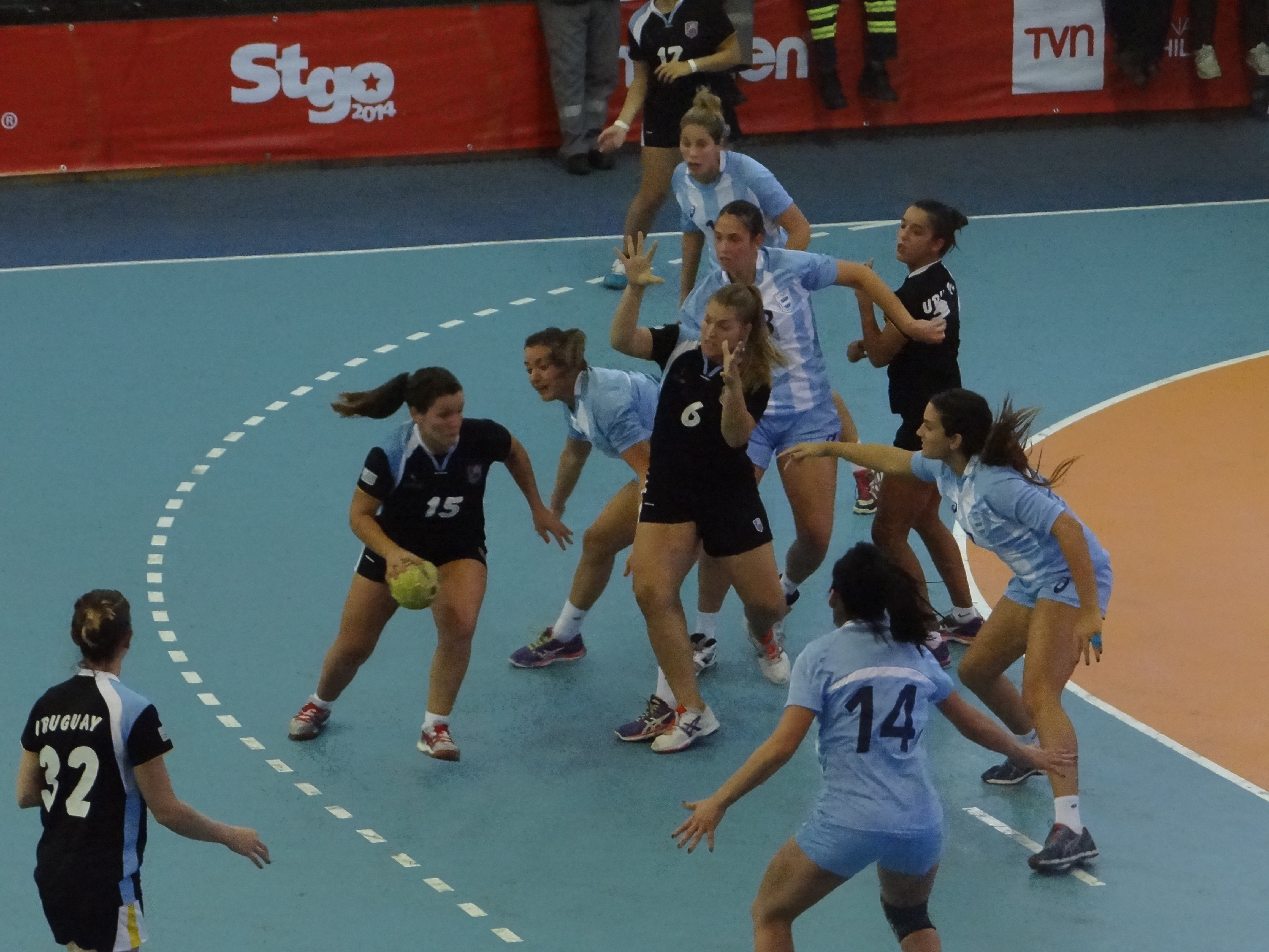 X Juegos Suramericanos Santiago 2014 Polideportivo Sausalito de Viña del Mar 11.03.2014 Balonmano femenino Argentina v. Uruguay